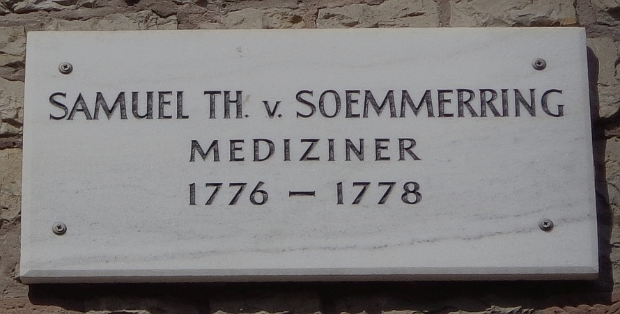 Göttinger Gedenktafel für Samuel Thomas von Soemmerring (Paulinerstraße 14)